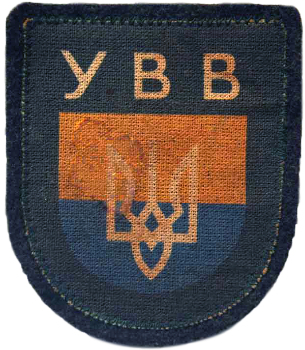 Шеврон Українського Визвольного Війська